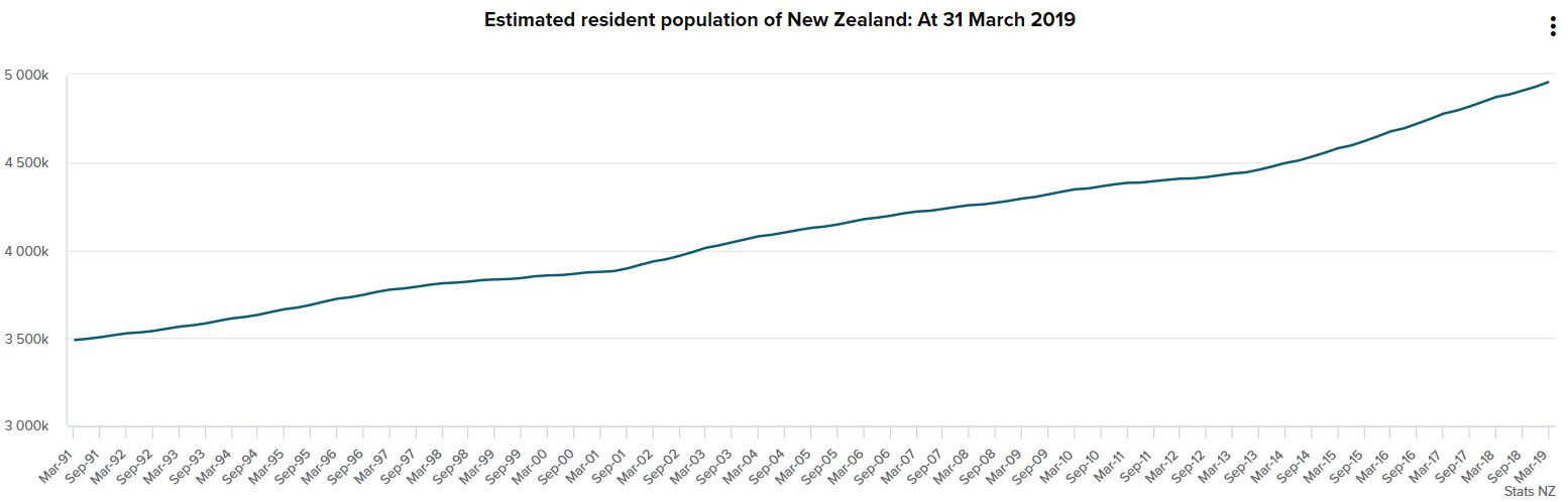 National population estimates At 31 March 2019